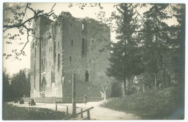 Tartu. Toomkiriku varemed